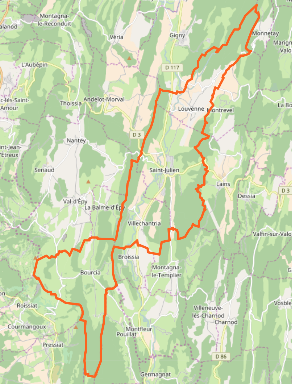 Limites communales de la commune nouvelle de Val Suran dans le Jura.